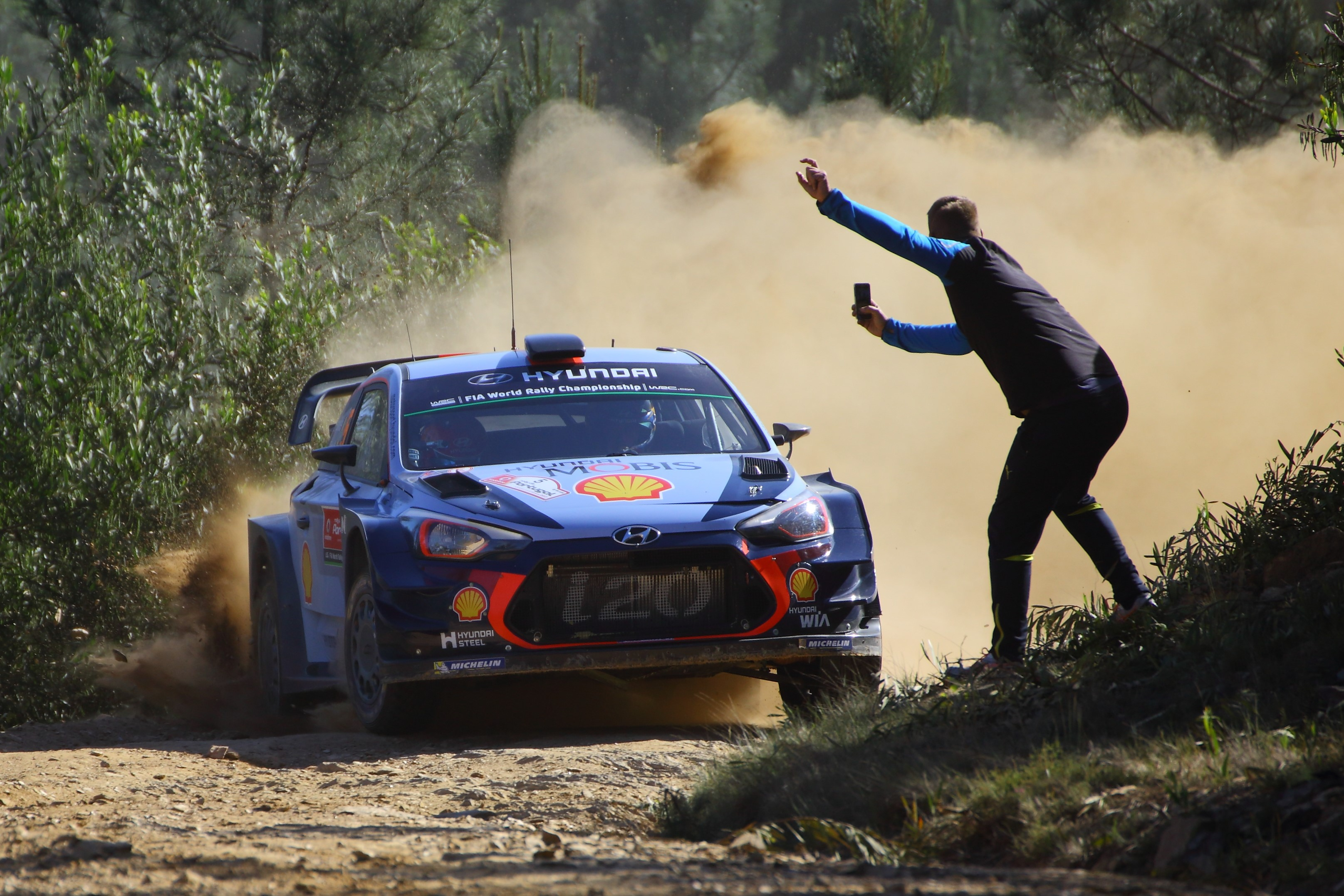 2017 Rally Portugal